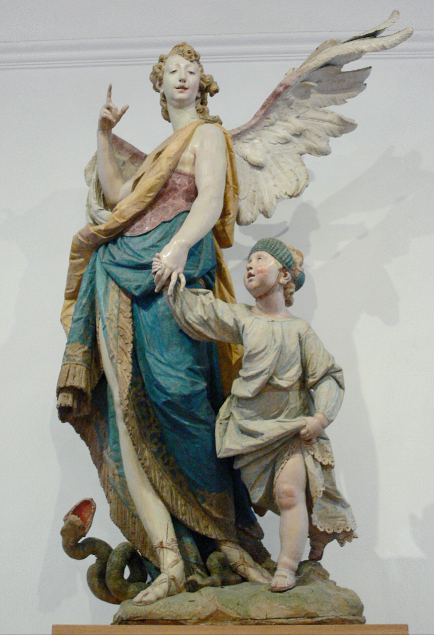 Ignaz Günther: Schutzengel, Lindenholz gefasst; aufgestellt im Bürgersaal München